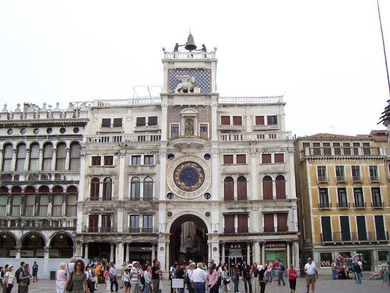 Venezia - Torre dell'Orologio in Piazza S. Marco